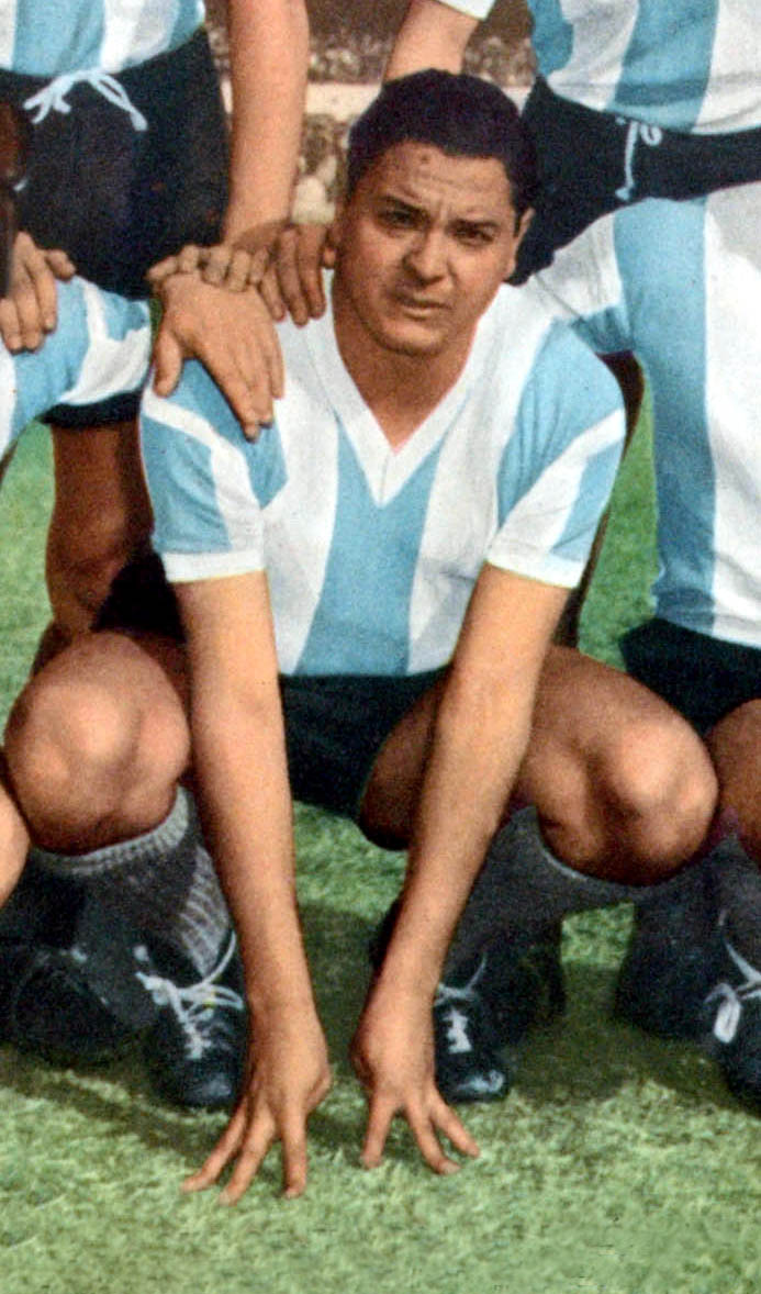 El Grafico del 05 de Junio de 1953. Edicion 1765